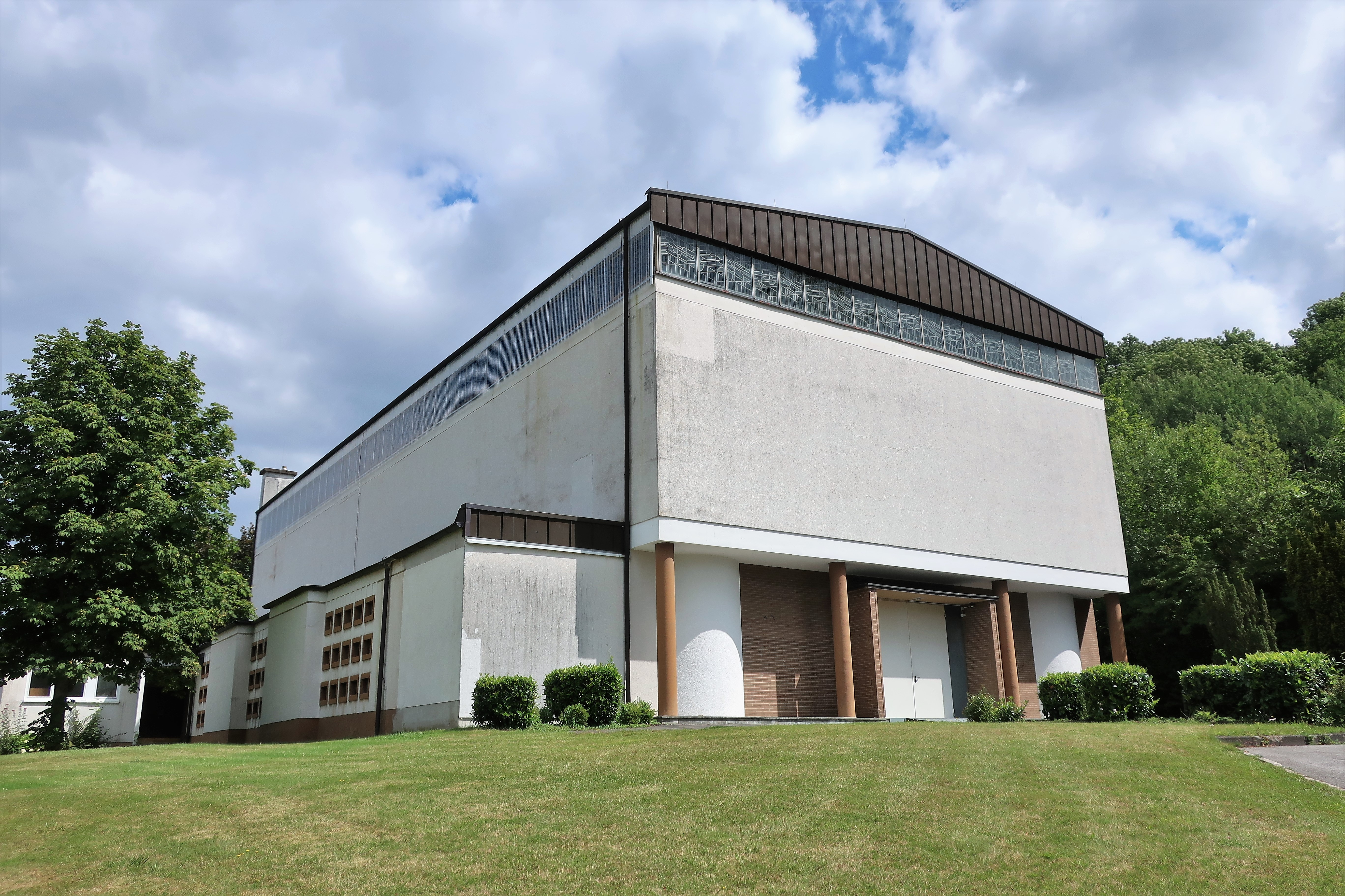 Ehemalige katholische St.-Josef-Kirche in Attendorn, St.-Josef-Straße. Die letzte Messe war am 21. September 2013. Danach wurde der Kirchturm abgebrochen und seitdem wird das Gebäude vom Bistum als Depot für sakrale Gegenstände genutzt.